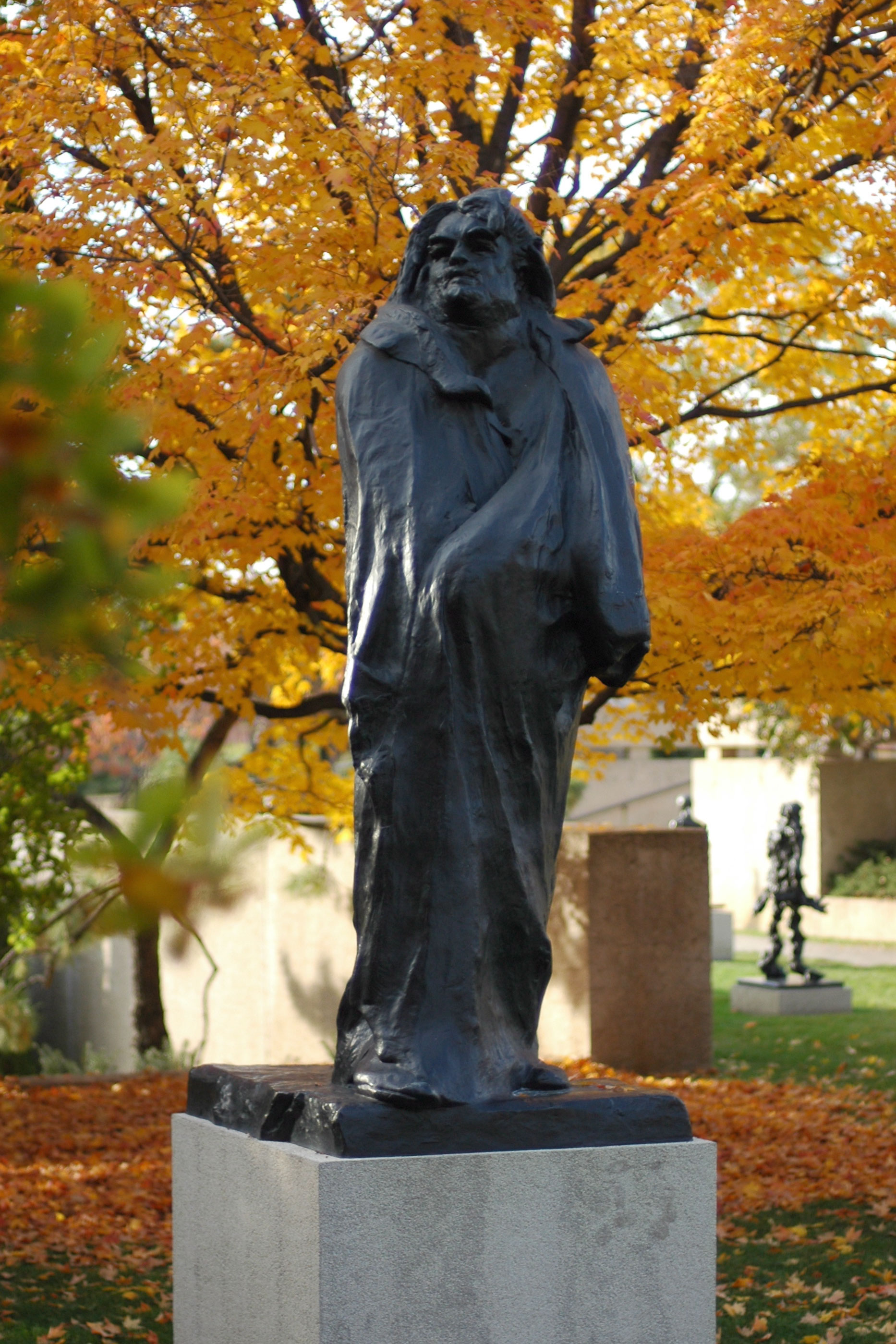 Auguste Rodin (French, 1840-1917): Monument to Balzac, 1898, bronze, 270 x 120 x 128 cm, Jardin du Musée Rodin in autumn, VIIe arrondissement, Paris, France.